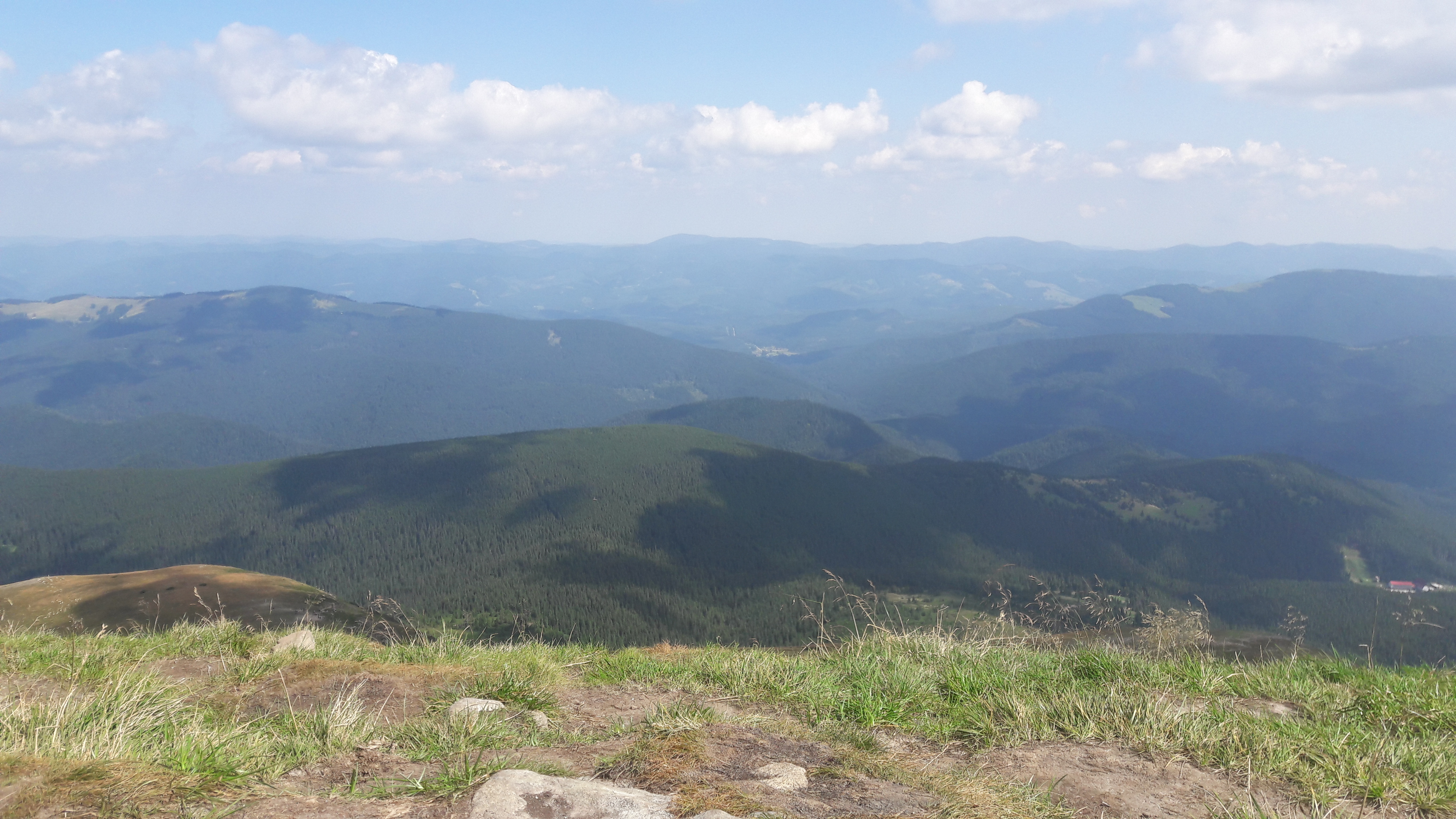 Карпатський біосферний заповідник, Рахівський, Тячівський, Хустський, Виноградівський райони